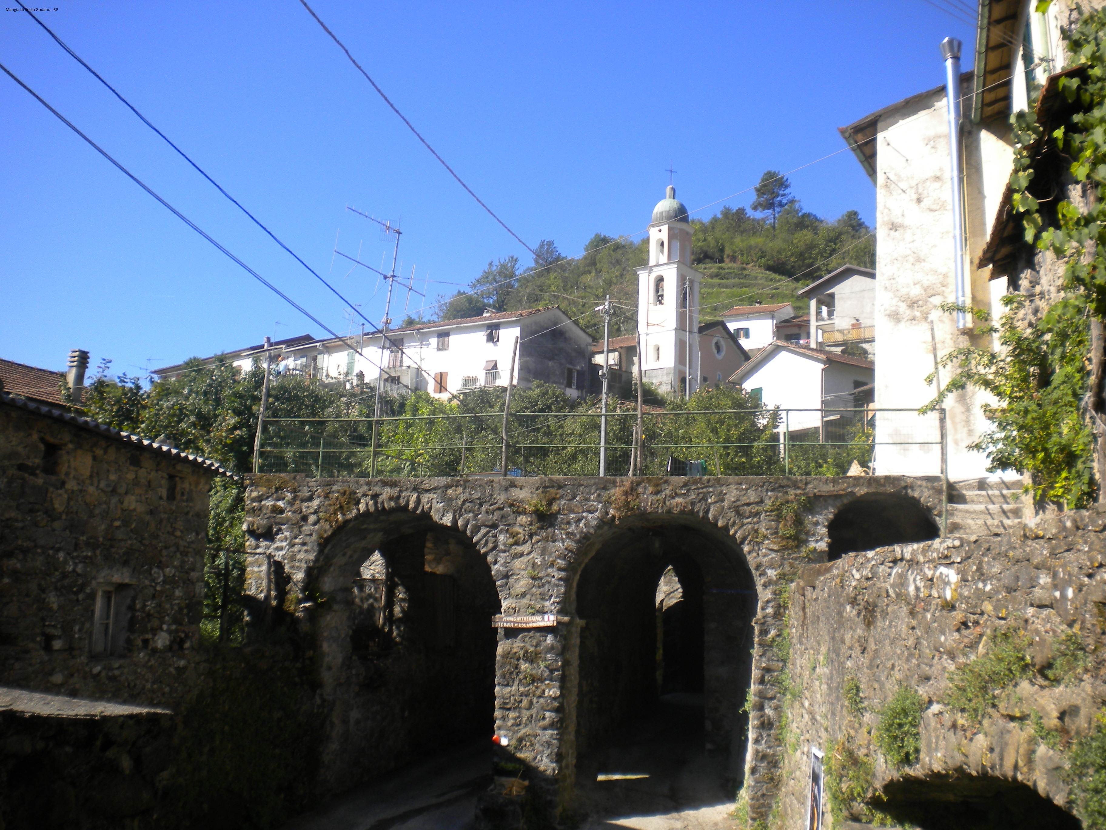 Vista